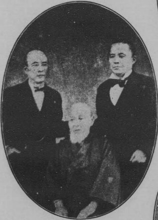 渡辺清（左）と渡辺昇（右）兄弟